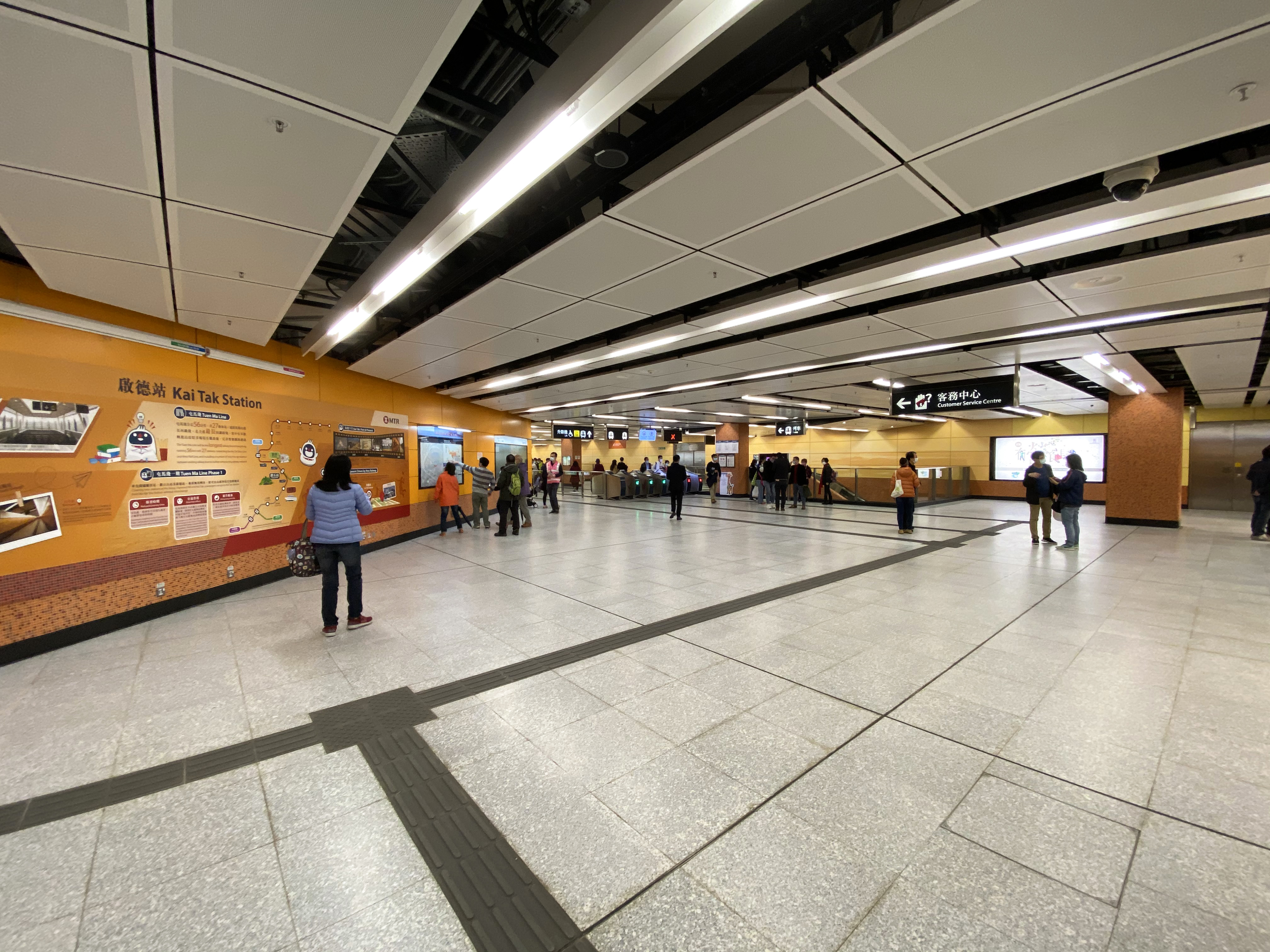 Kai Tak Station